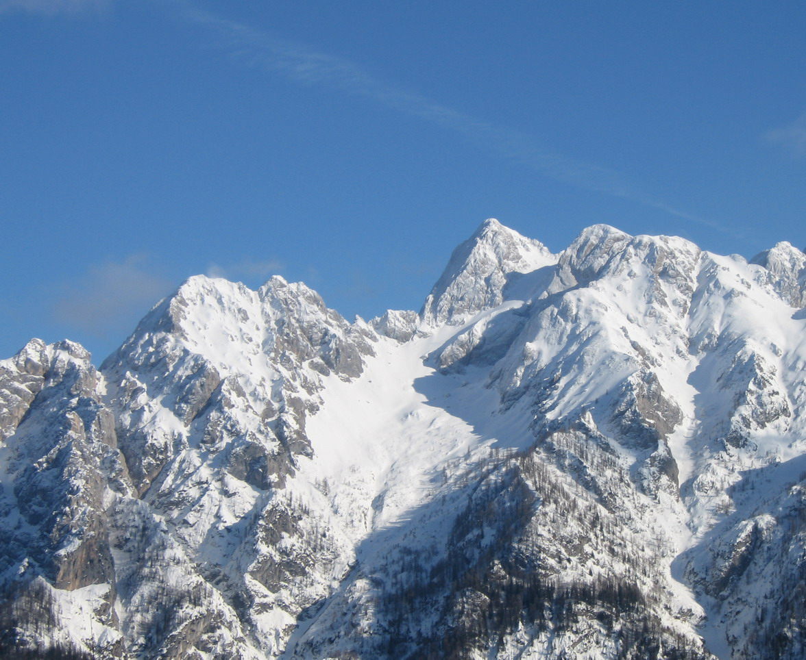 Julijske alpe, Špik, Frdamane police